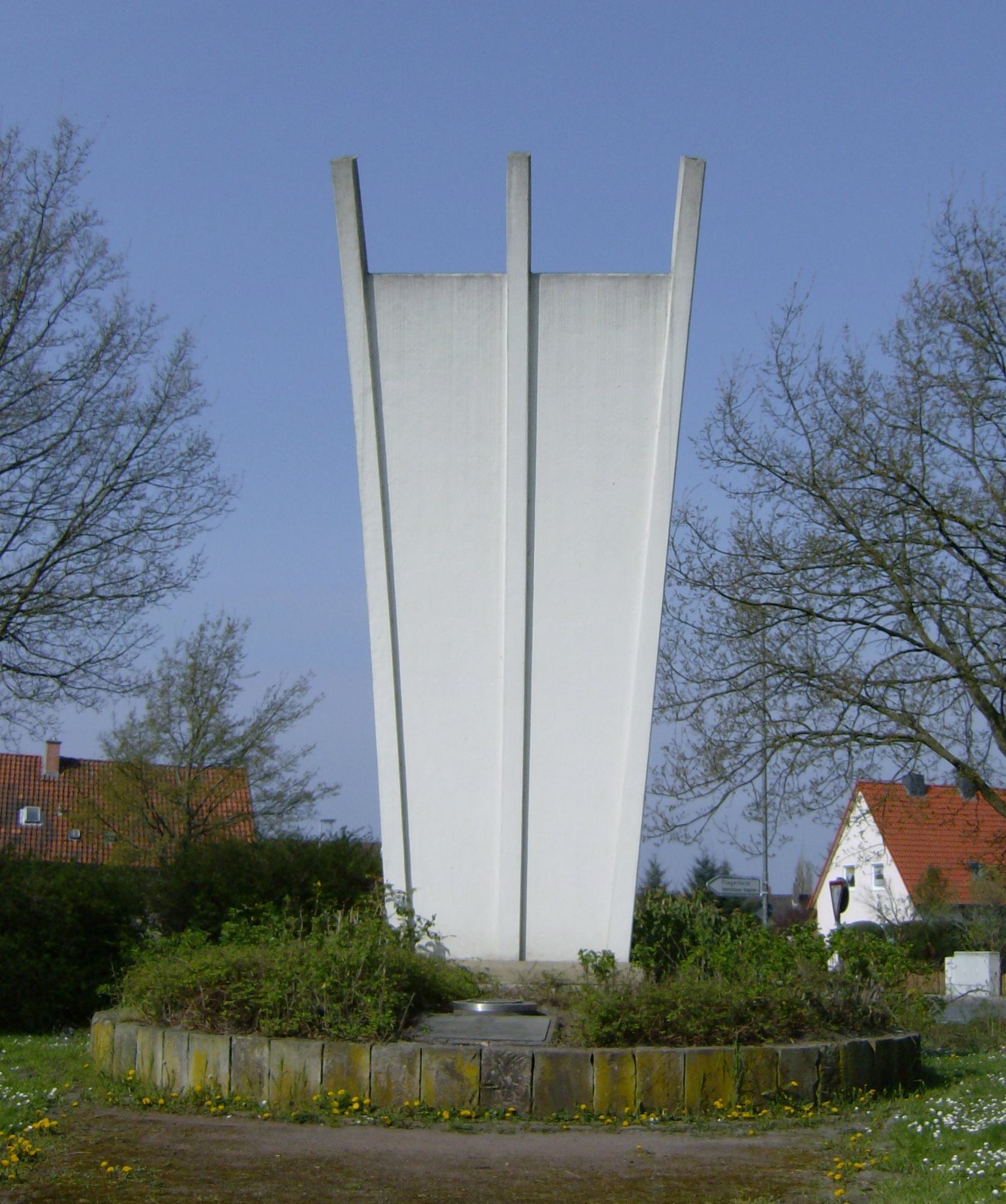 Abbildung des Luftbrückendenkmals in Celle-Wietzenbruch